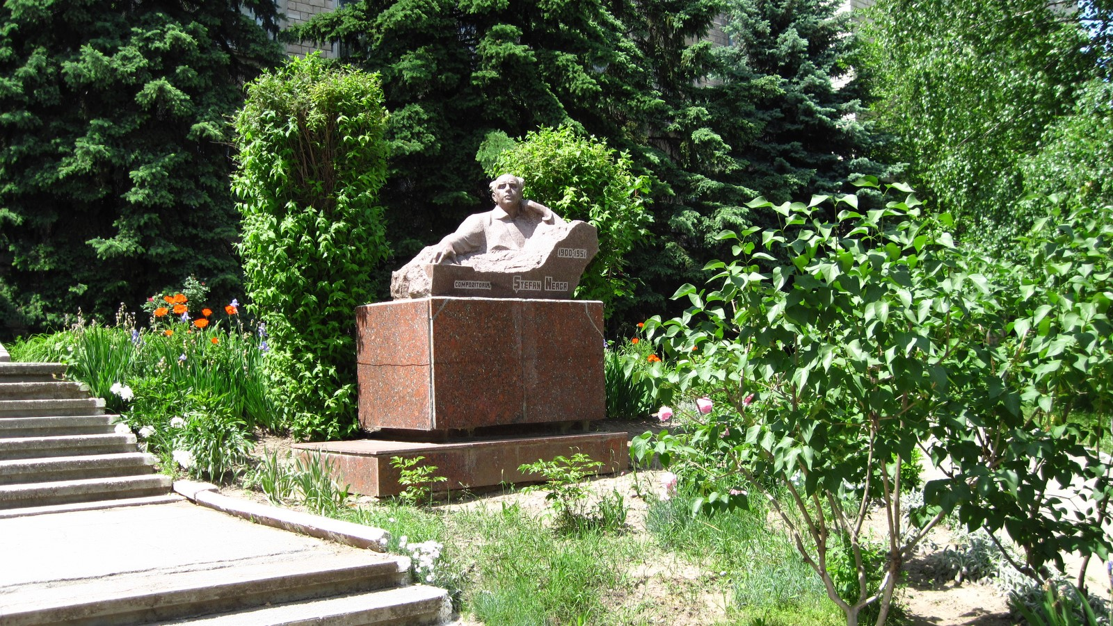 Chisinau, Moldova